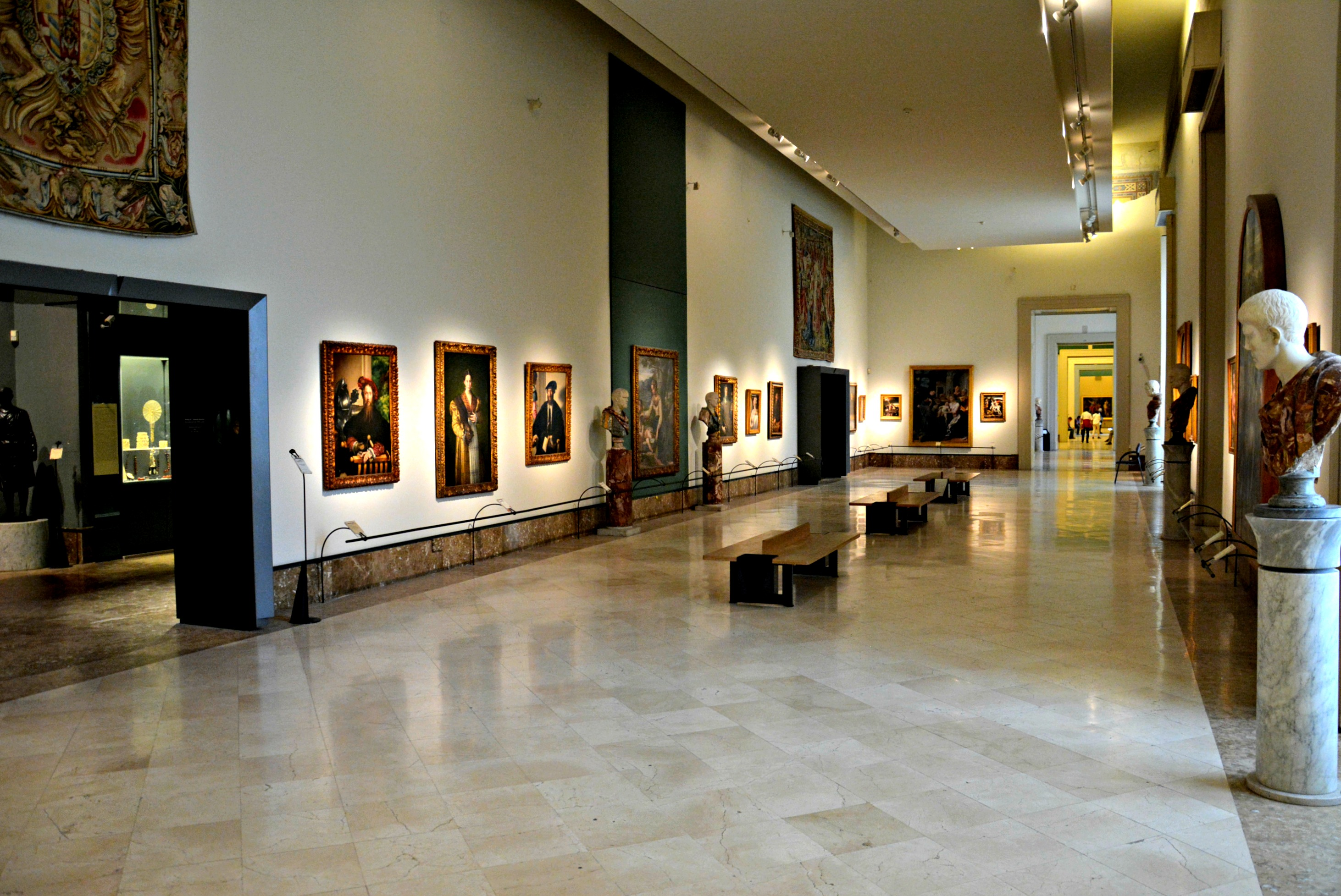 Vedi titolo